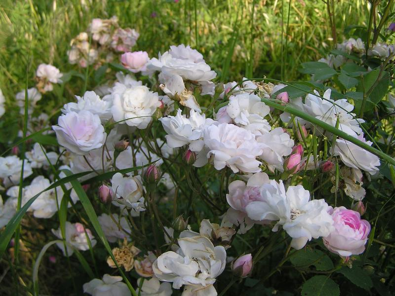 Pompon de Paris ou little pet